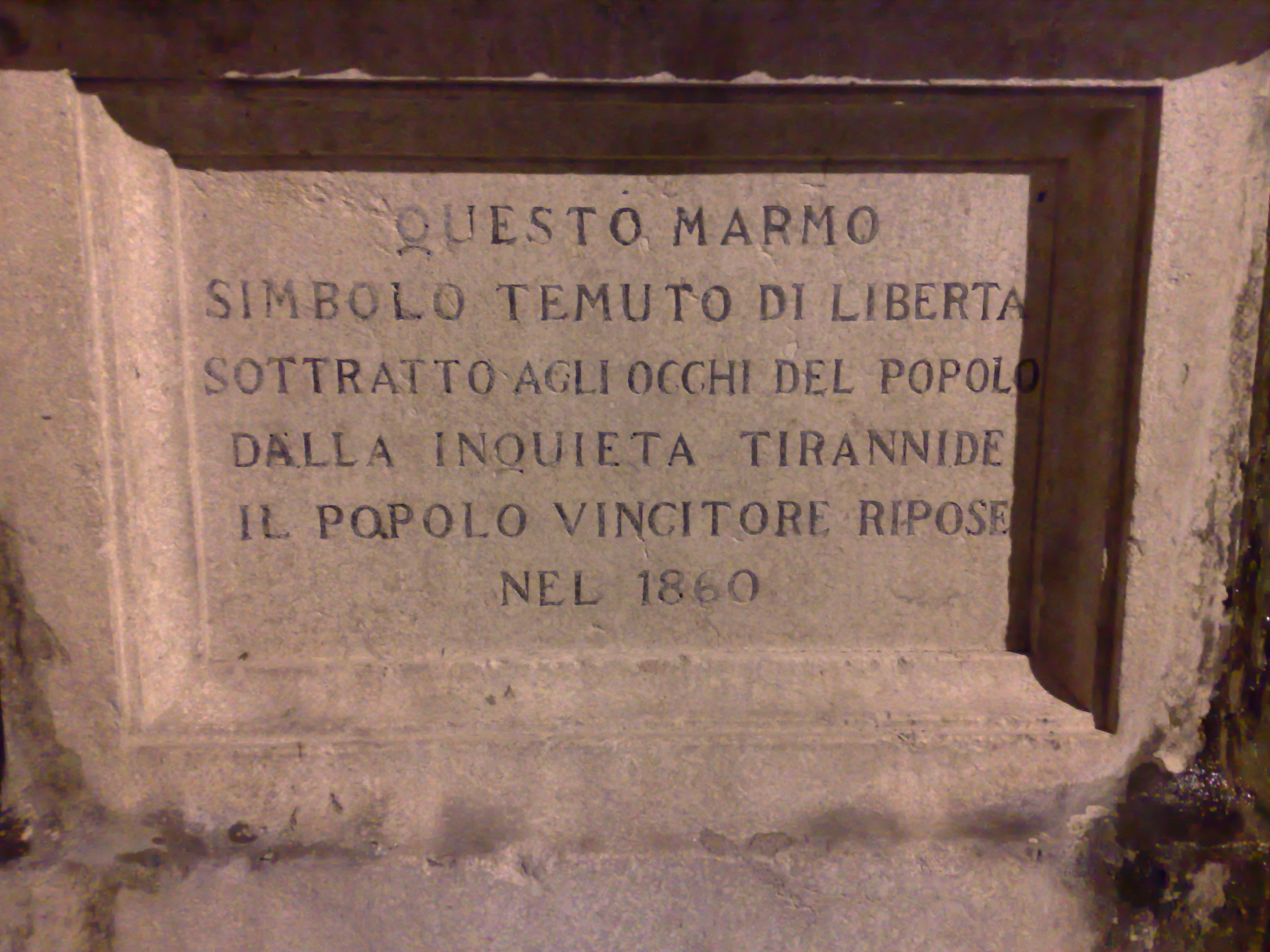 Iscrizione nella fontana del Genio di Palermo (piazza Rivoluzione), che ricorda i moti del 1860